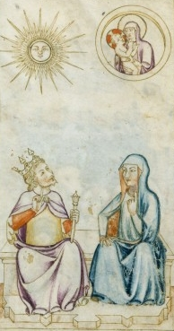 L'empereur Auguste avec la Sybille de Tibure. Dans le médaillon en haut à droite : la Vierge Marie avec l'enfant Jésus.